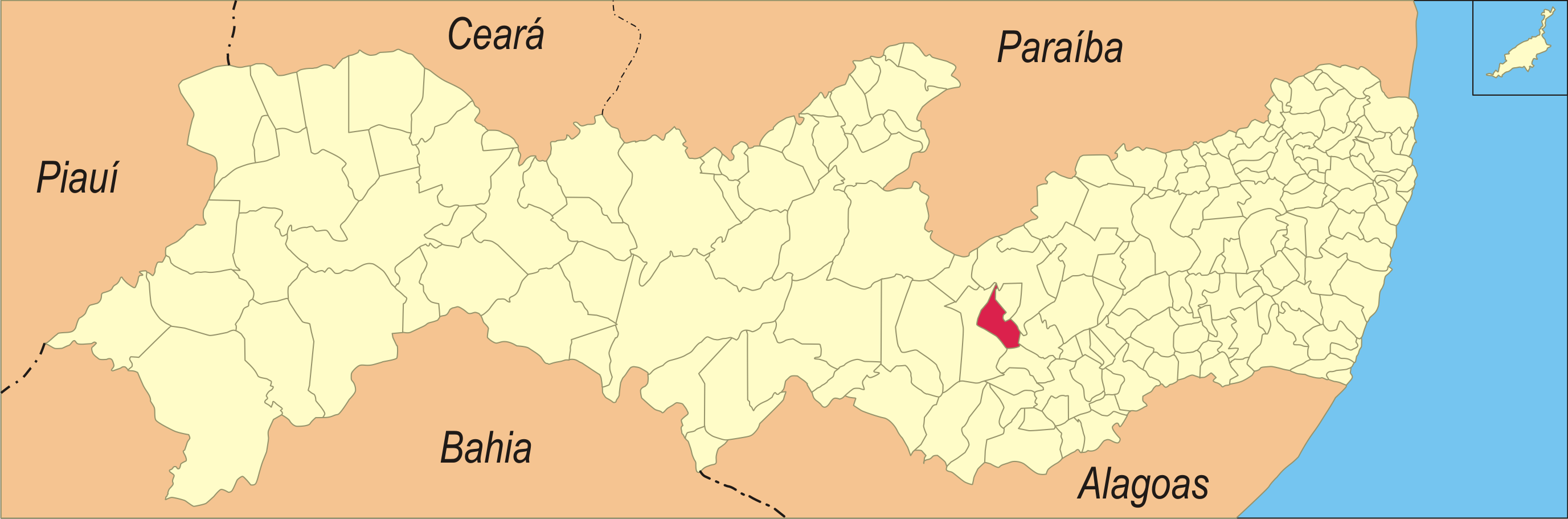 Localização da cidade em Pernambuco.